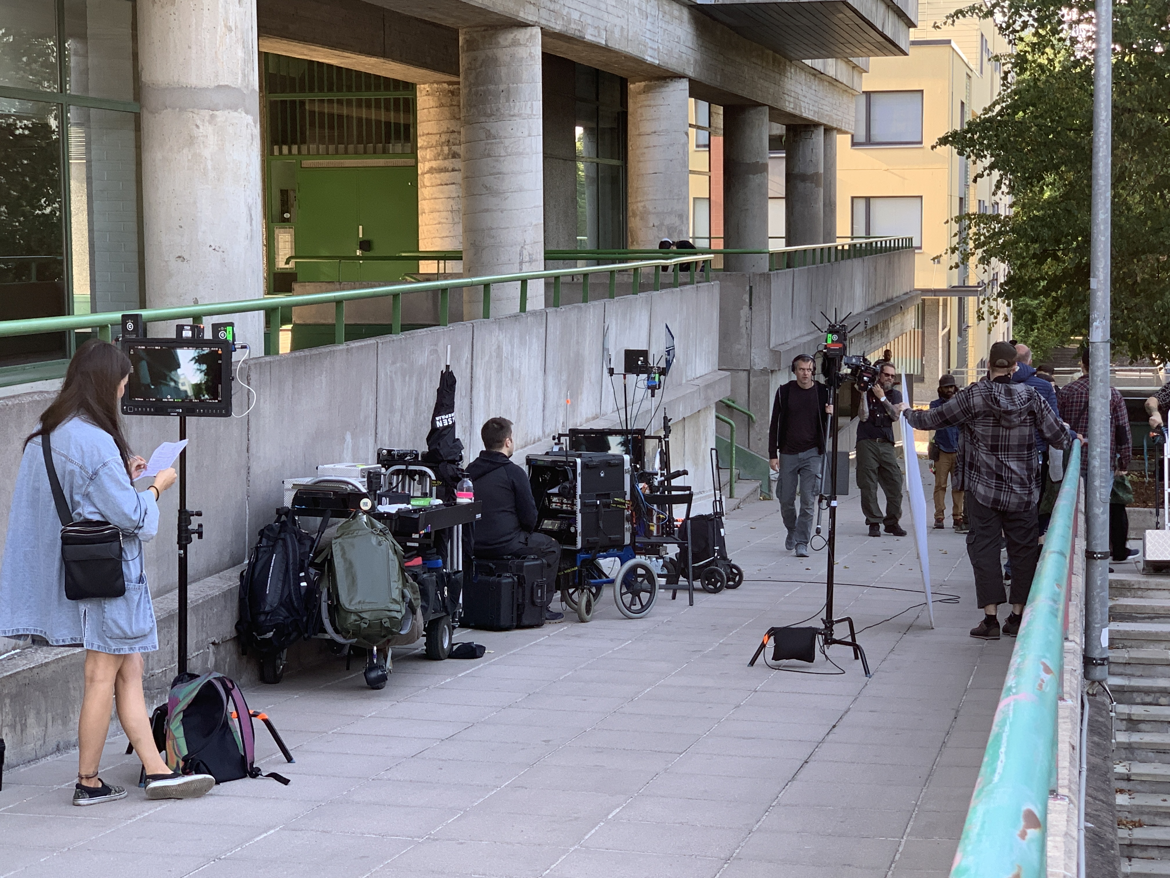 Ruotsalaista TV-sarjaa kuvataan Asemapäällikönhovilla kesällä 2019.